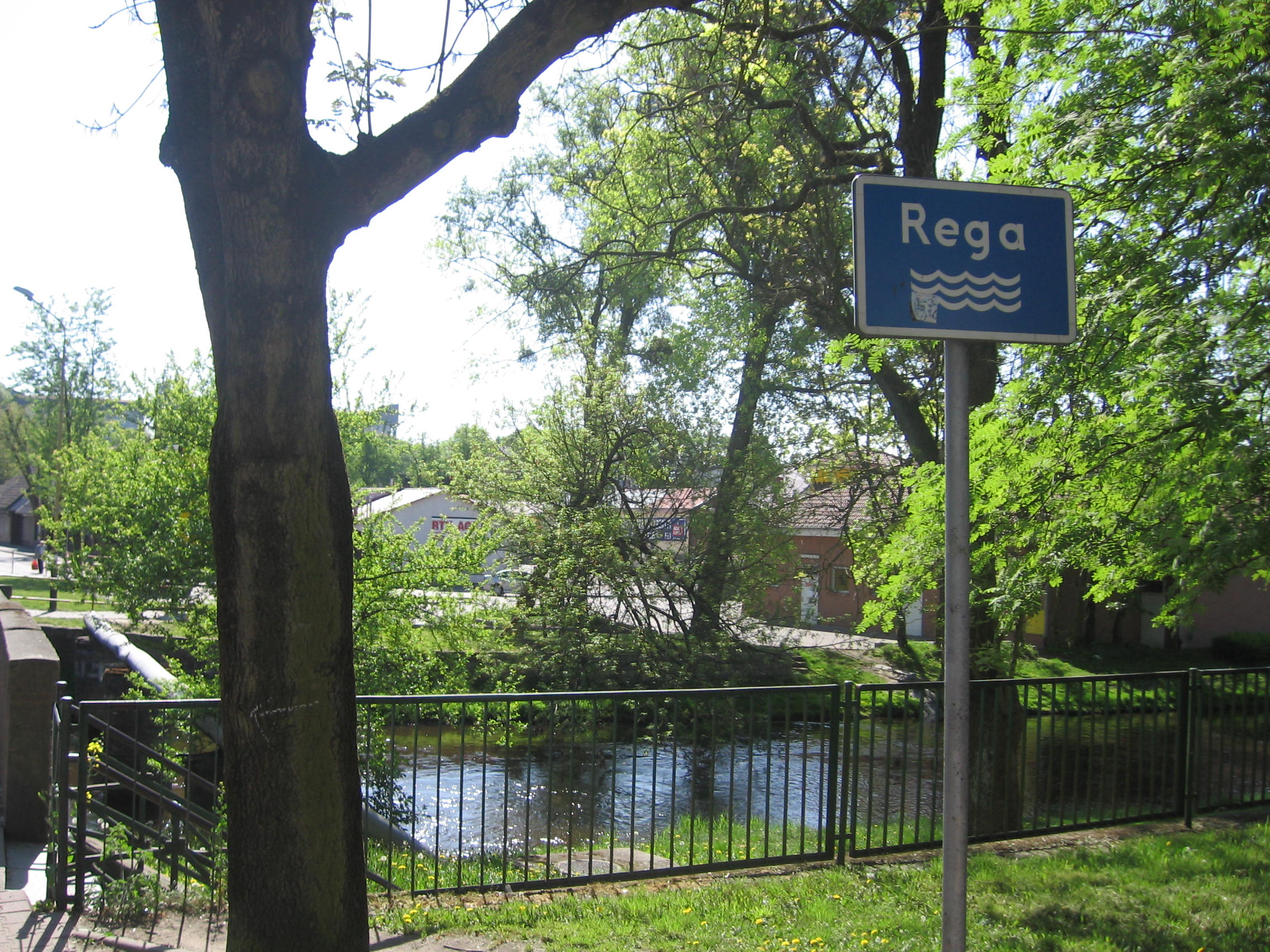 Rzeka Rega w ŁobzieThe Rega river in Łobez